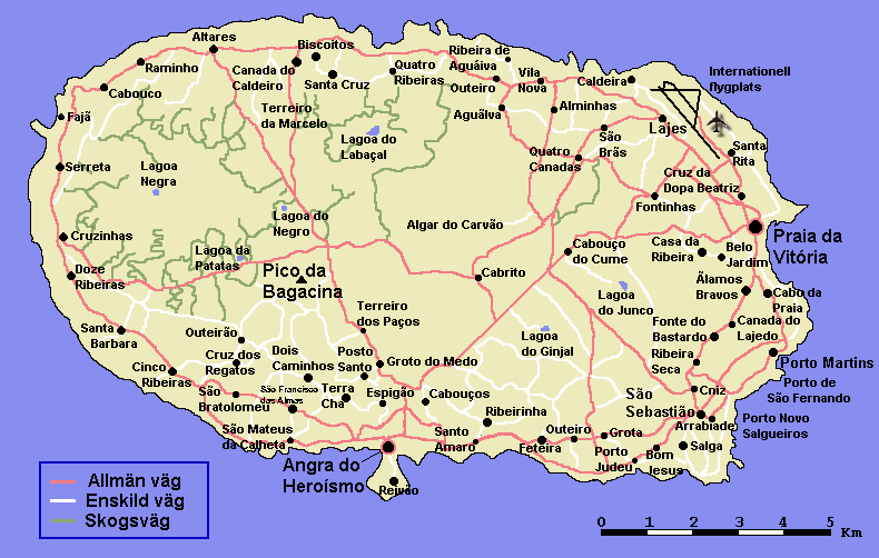 En karta över ön Terceira i Azorerna. Ritad av Användare:Chrizz